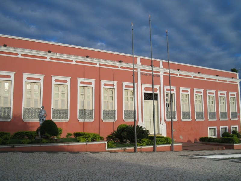 Sede da Prefeitura de Baturité, antiga cadeia publica